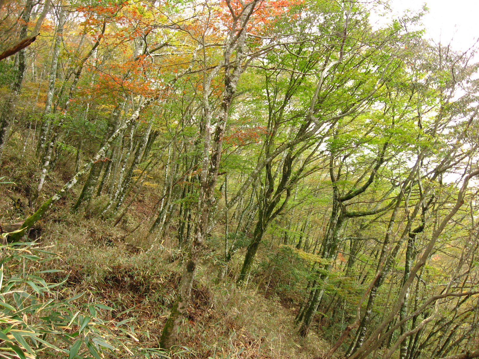 檜洞丸付近のブナ林